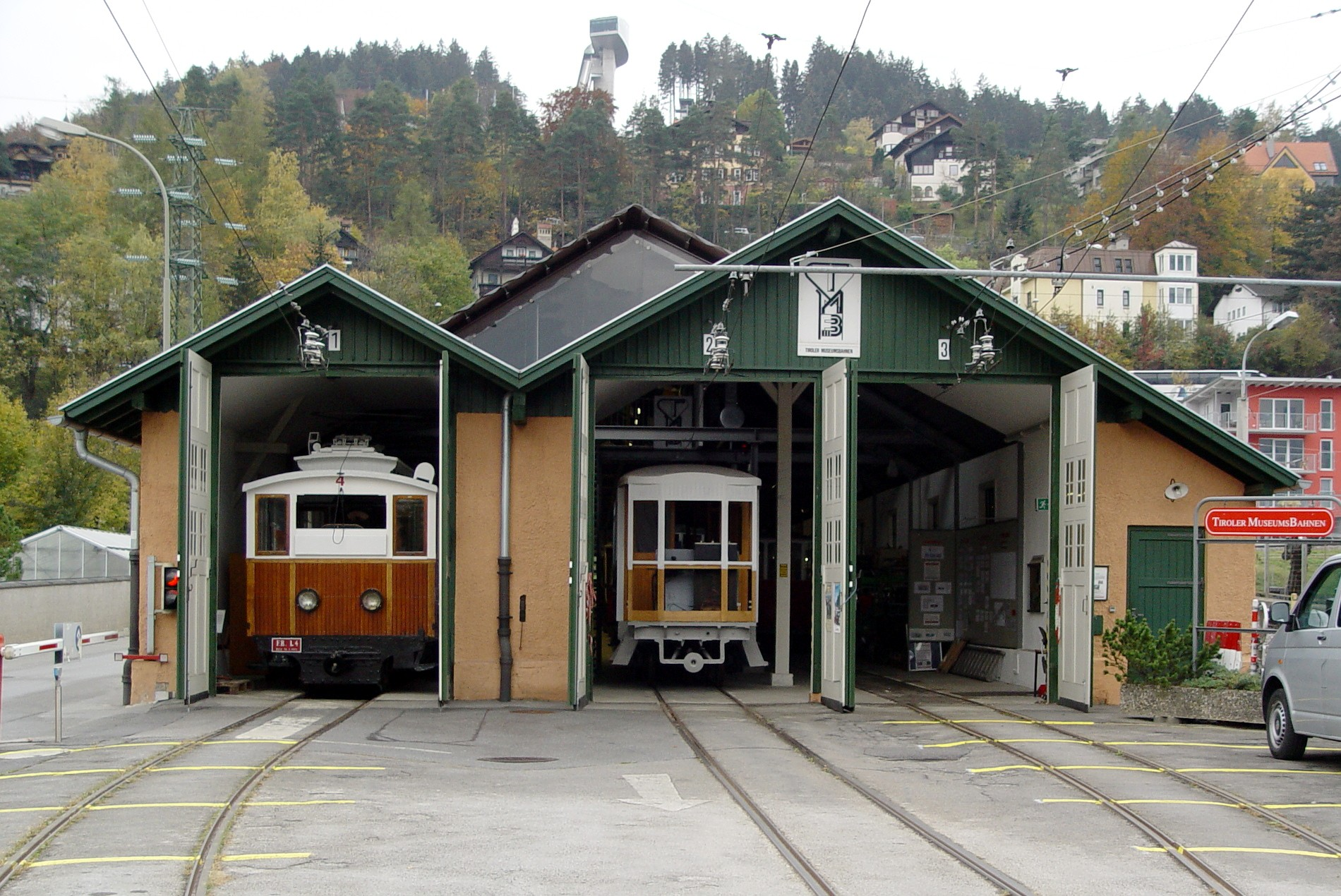 Remise der Stubaitalbahn heute - Museumsremise der Tiroler Museumsbahnen This media shows the remarkable cultural object in the Austrian state of Tyrol listed by the Tyrolean Art Cadastre with the ID 68583. (on tirisMaps, pdf, more images on Commons, Wikidata)